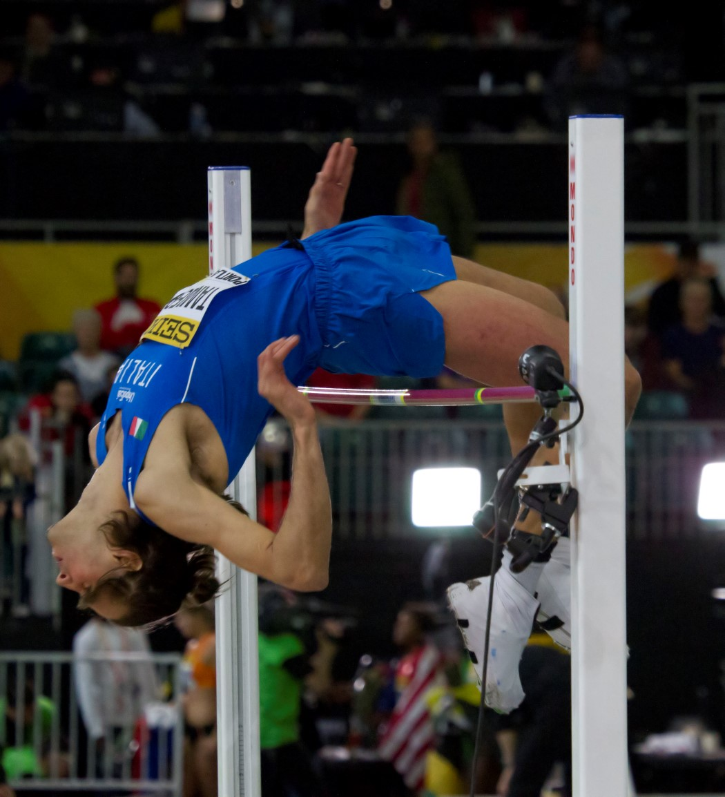 582 tamberi over 2m36